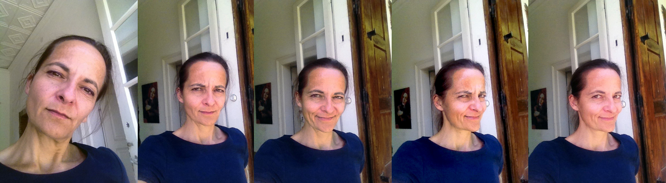 Selbstportrait Birgit Scheiger